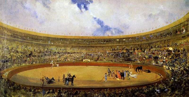 Ramon Martí Alsina